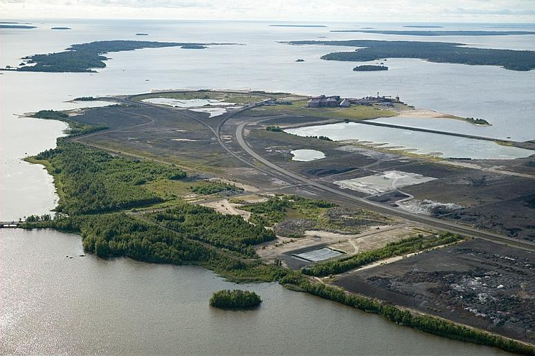 Svartö industriområde med malmhamnen och hamninloppet till Luelå i bakgrunden. Motiv: Luleå Nyckelord: Flygbilder Kategori: Hamnmiljöer Svartö industriområde med malmhamnen och hamninloppet till Luelå i bakgrunden.